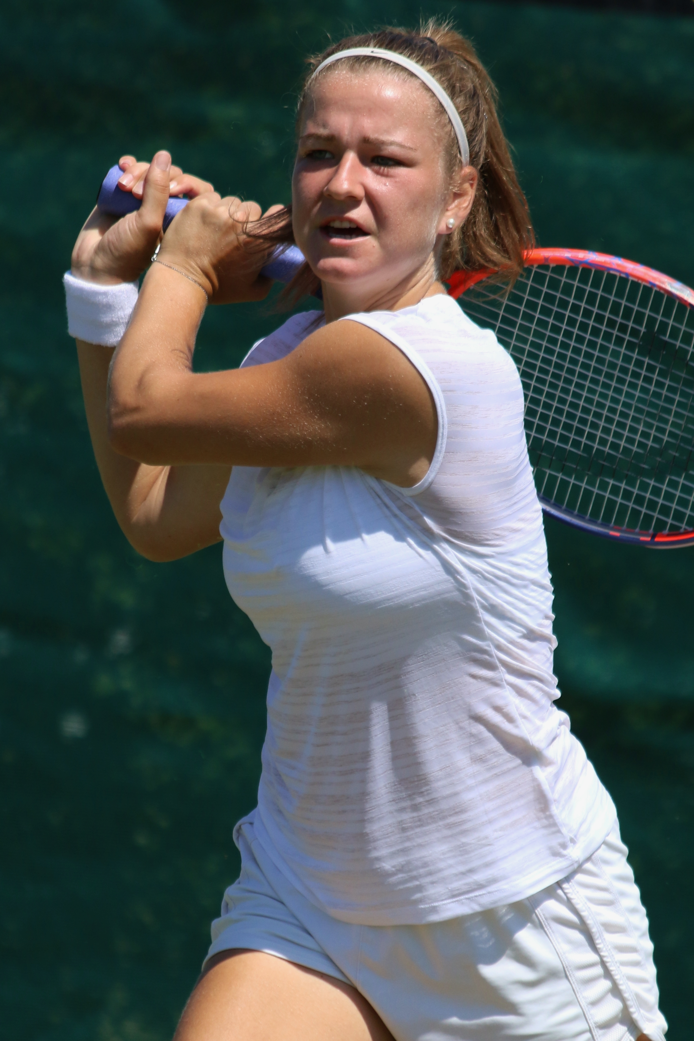 Muchova WMQ18 (10)